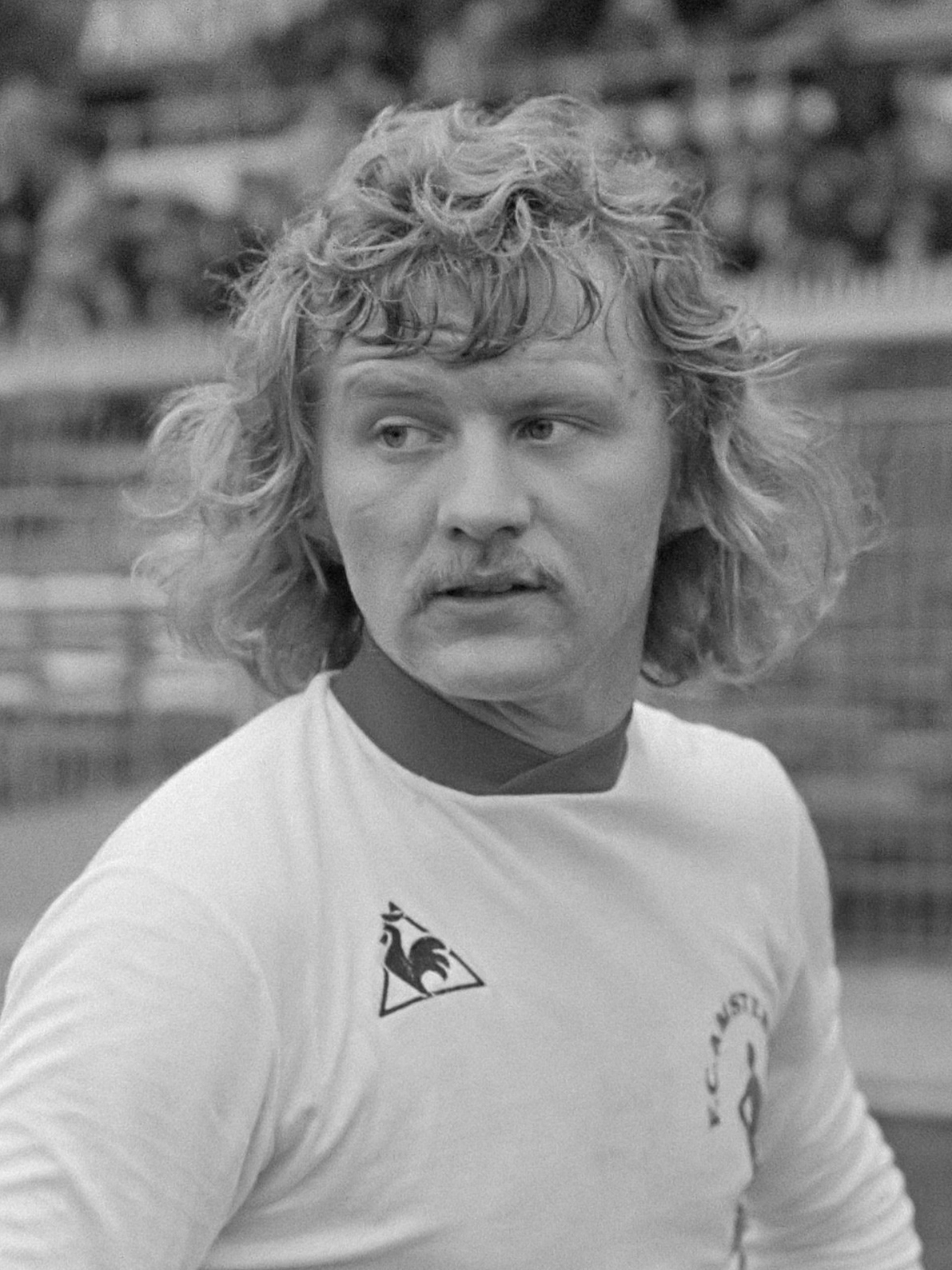 FC Amsterdam tegen Ajax 1-3, beker; nieuwe Amsterdam aanwinst Bjarne Petersen 7 december 1975